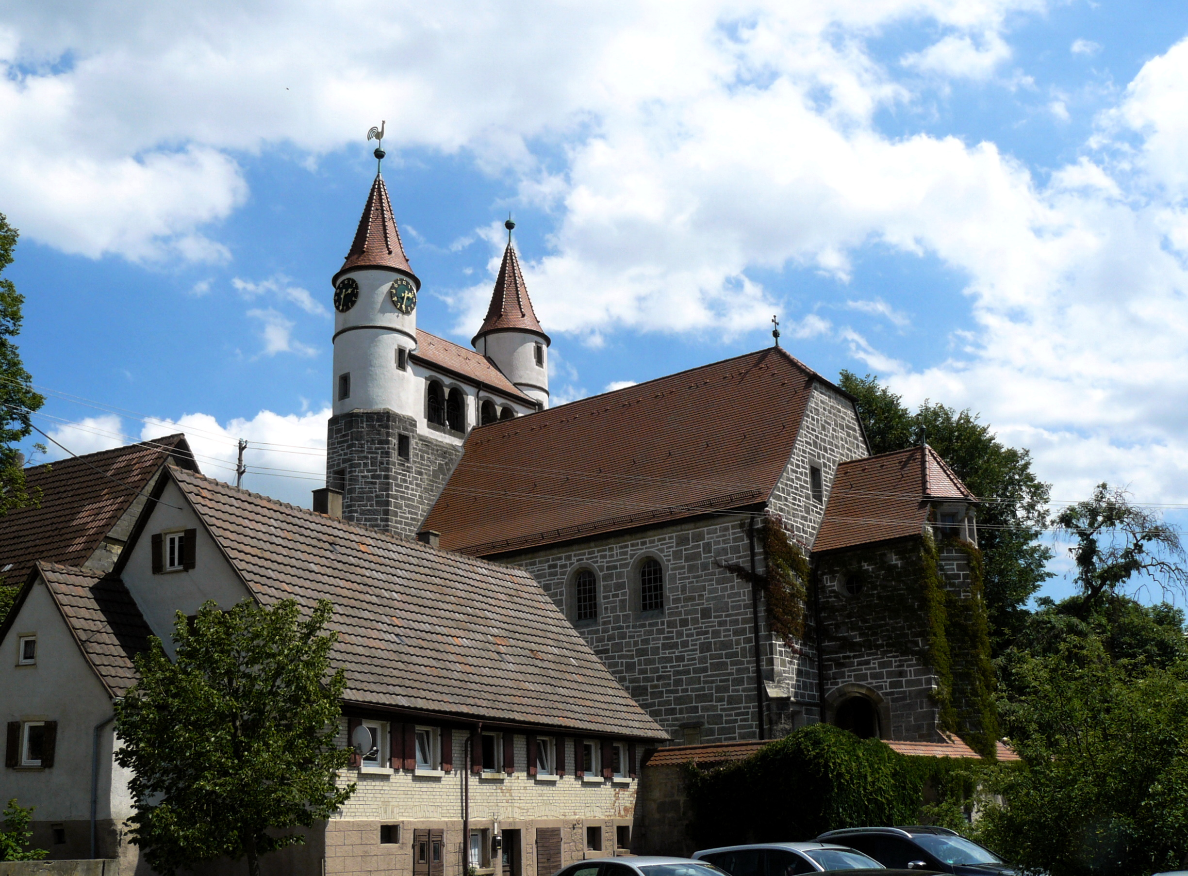 Evangelische Pfarrkirche in Gaggstatt, Gemeinde Kirchberg an der Jagst